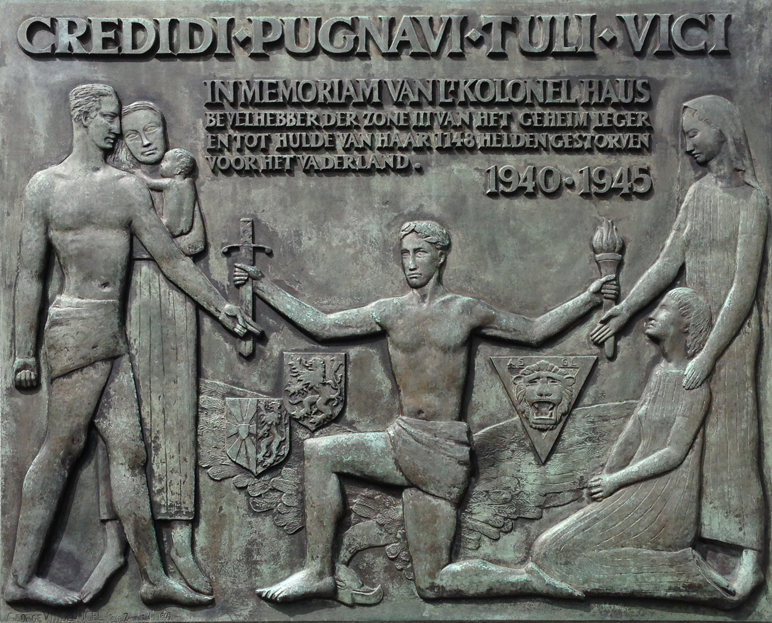 gedenkplaat August Haus in Gent